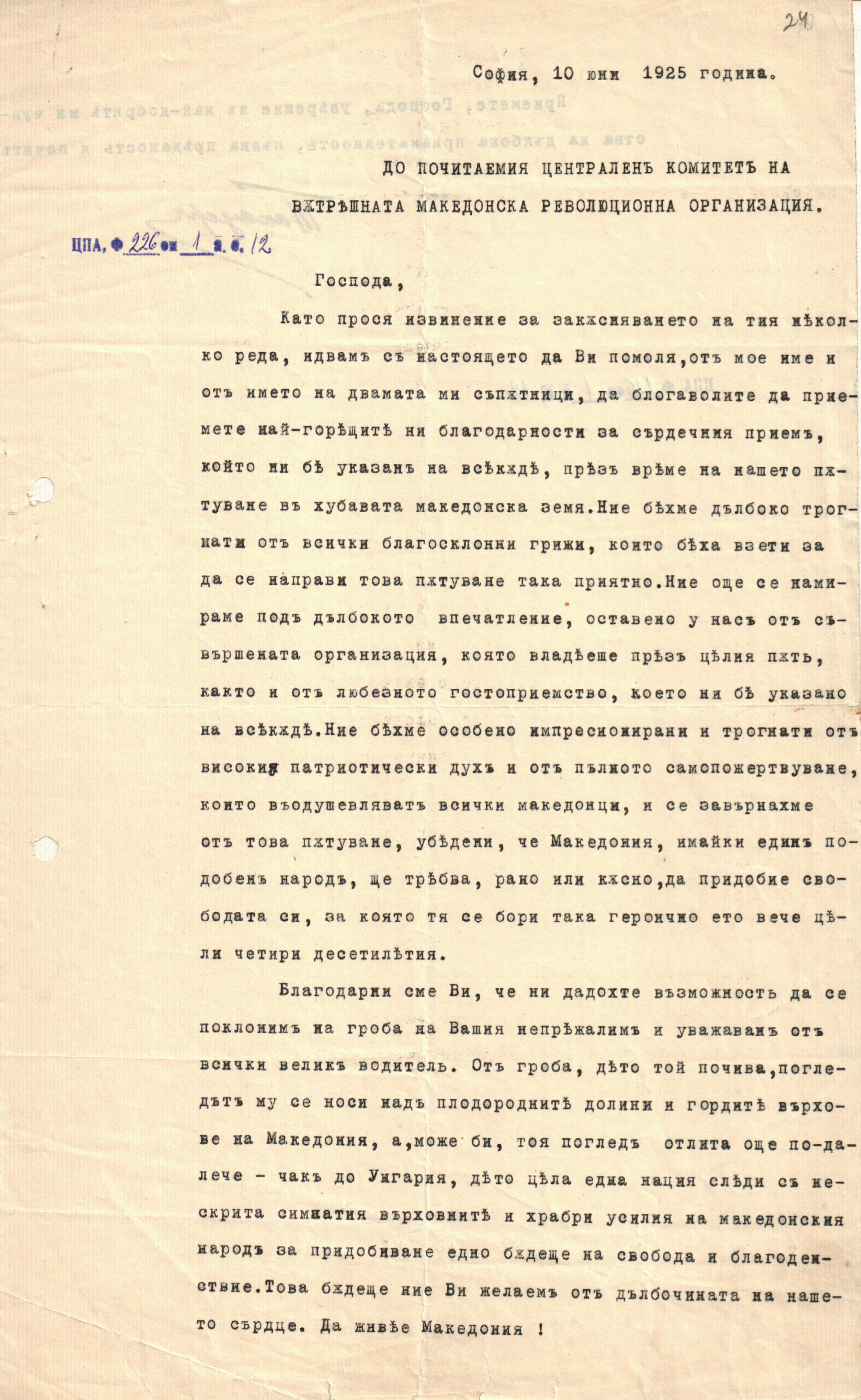 Писма от лица и ВМРО до ЦК и ЗП на ВМОРО за връзки с гръцки четници по време на Илинденското въстание, организирането на чети от Герджиков(ич) в Сърбия; връзки между ВМОРО и арменската революционна организация „Дашнакцутюн“, събиране на федеристи и комунисти в читалище „Гоце Делчев“ в София; дейността на П. Шатев, М. Герджиков и Спиро Василев сред емиграцията в Цариград; разпределяне работата в пунктовете и др.